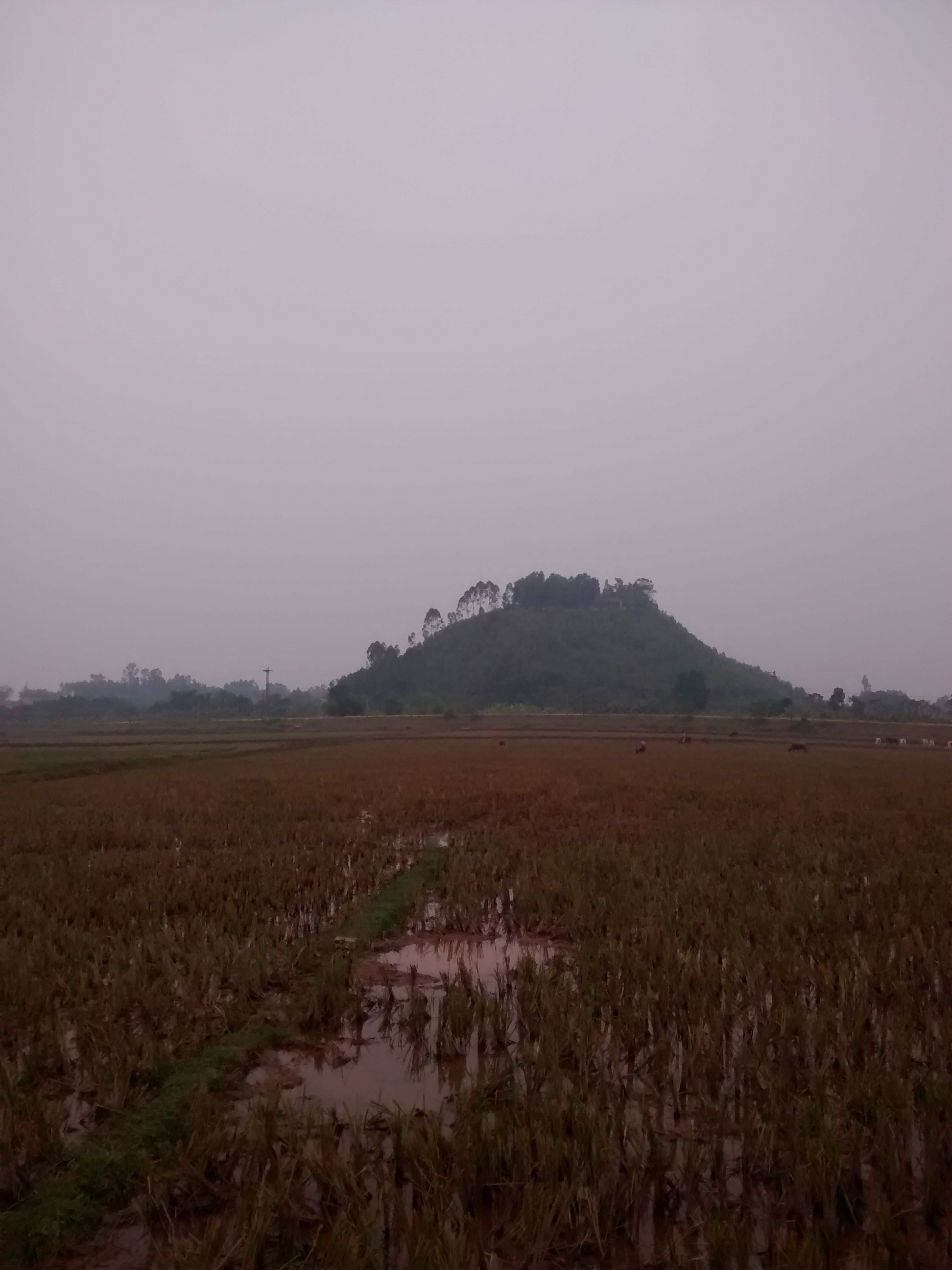 Cánh đồng ở xã Điêu Lương